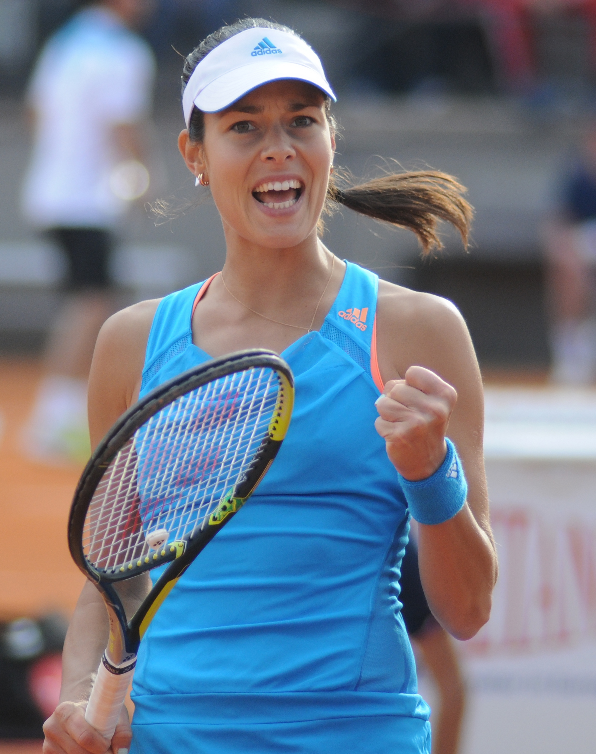 Ana Ivanović at the 2014 Internazionali BNL d'Italia